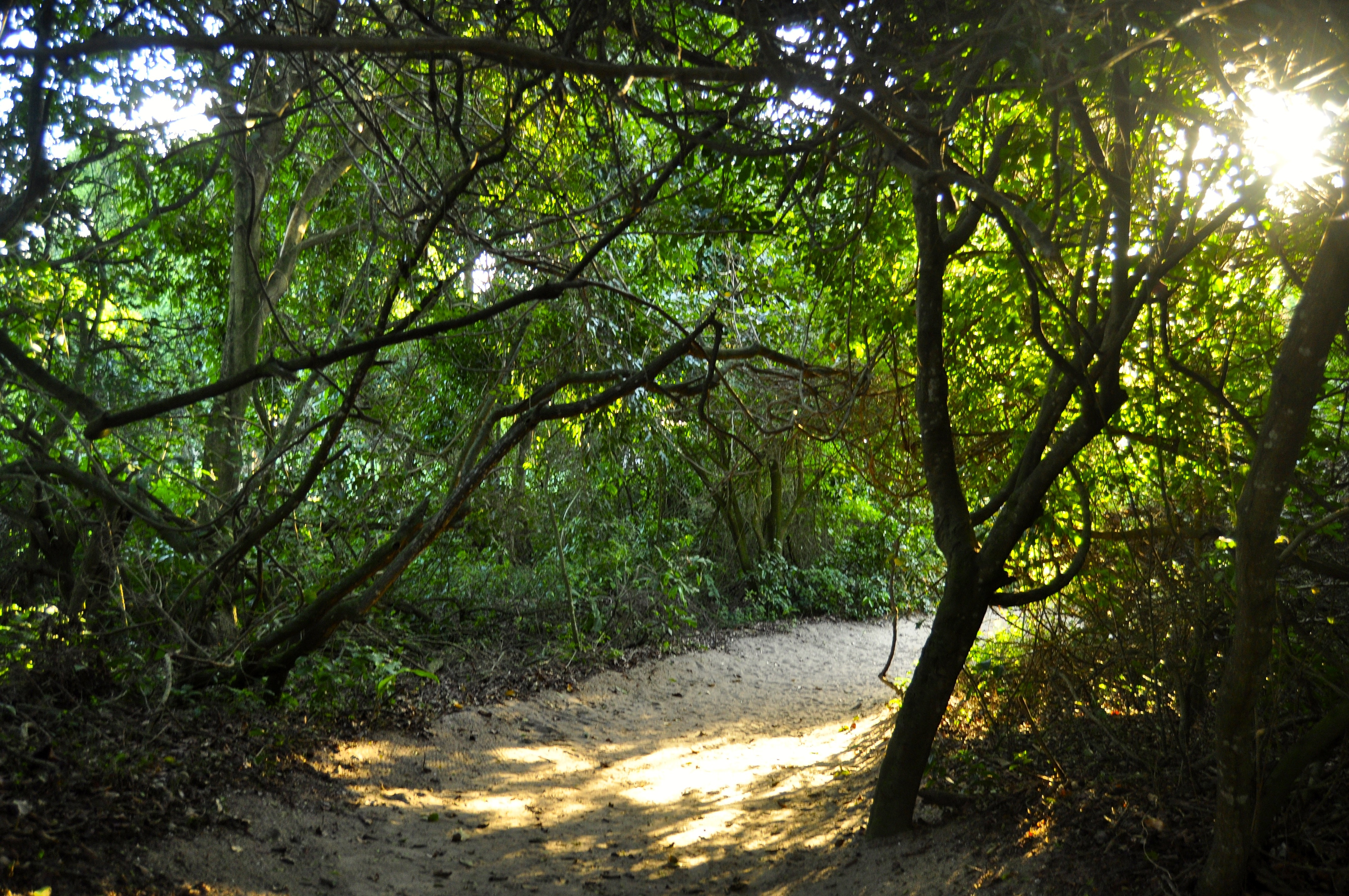 Trilha no Parque Chico Mendes.